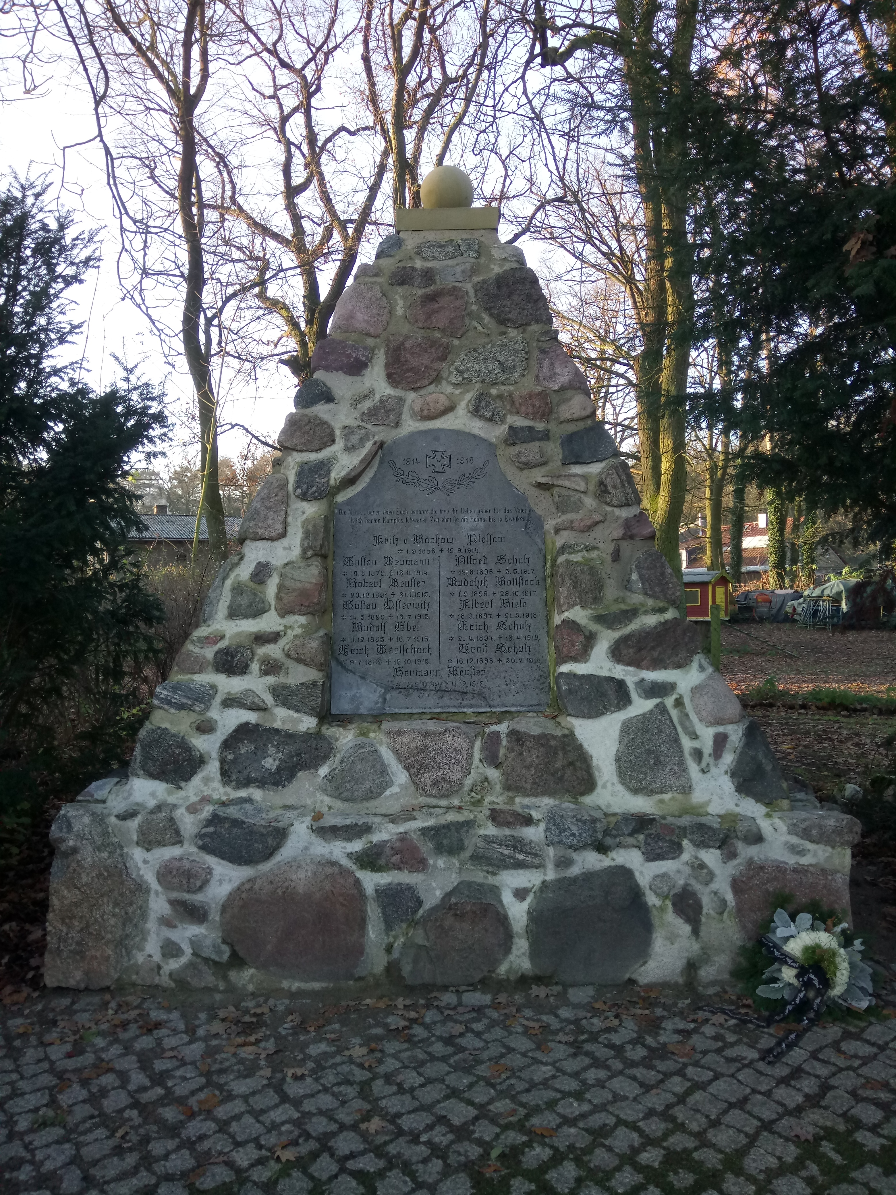 Das Denkmal wurde in den 1920er Jahren errichtet und besteht aus Feldsteinen. Ein genaues Datum ist unbekannt. Auf einer Tafel eingestanzt sind die Namen von im Ersten Weltkrieg gefallenen Soldaten aus Kammerode.